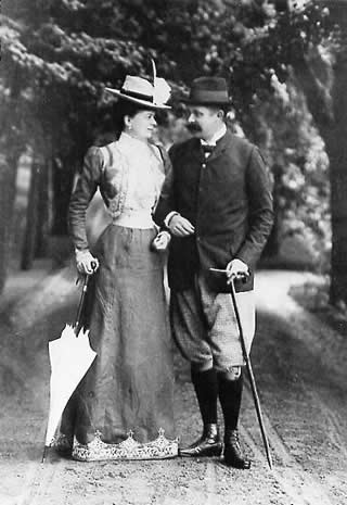 Photo de l'archiduc François-Ferdinand et de son épouse Sophie Chotek en promenade